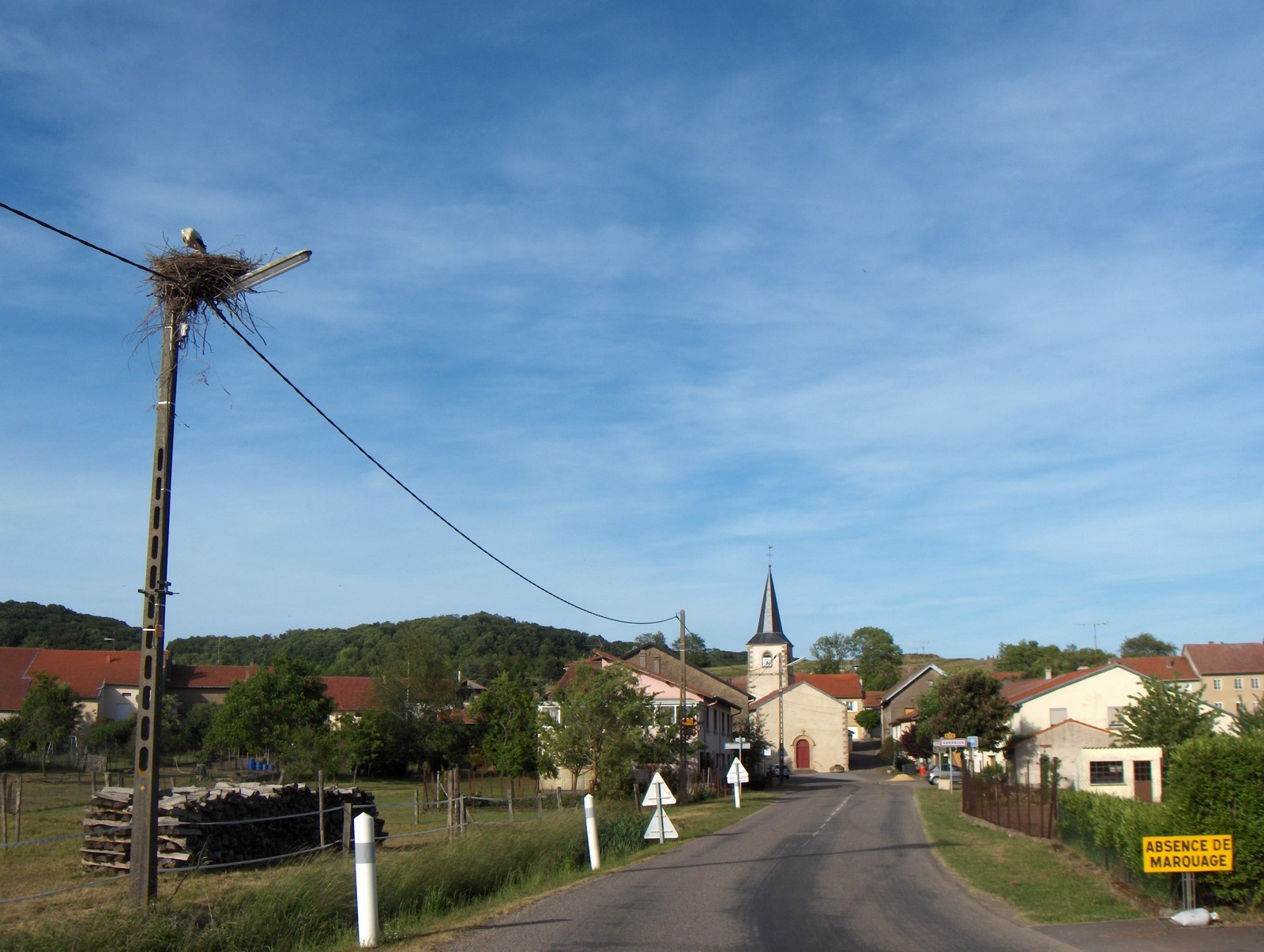 Harprich, Gemeinde im Departement Moselle, Frankreich. Einige Storchnester am Dorfrand.